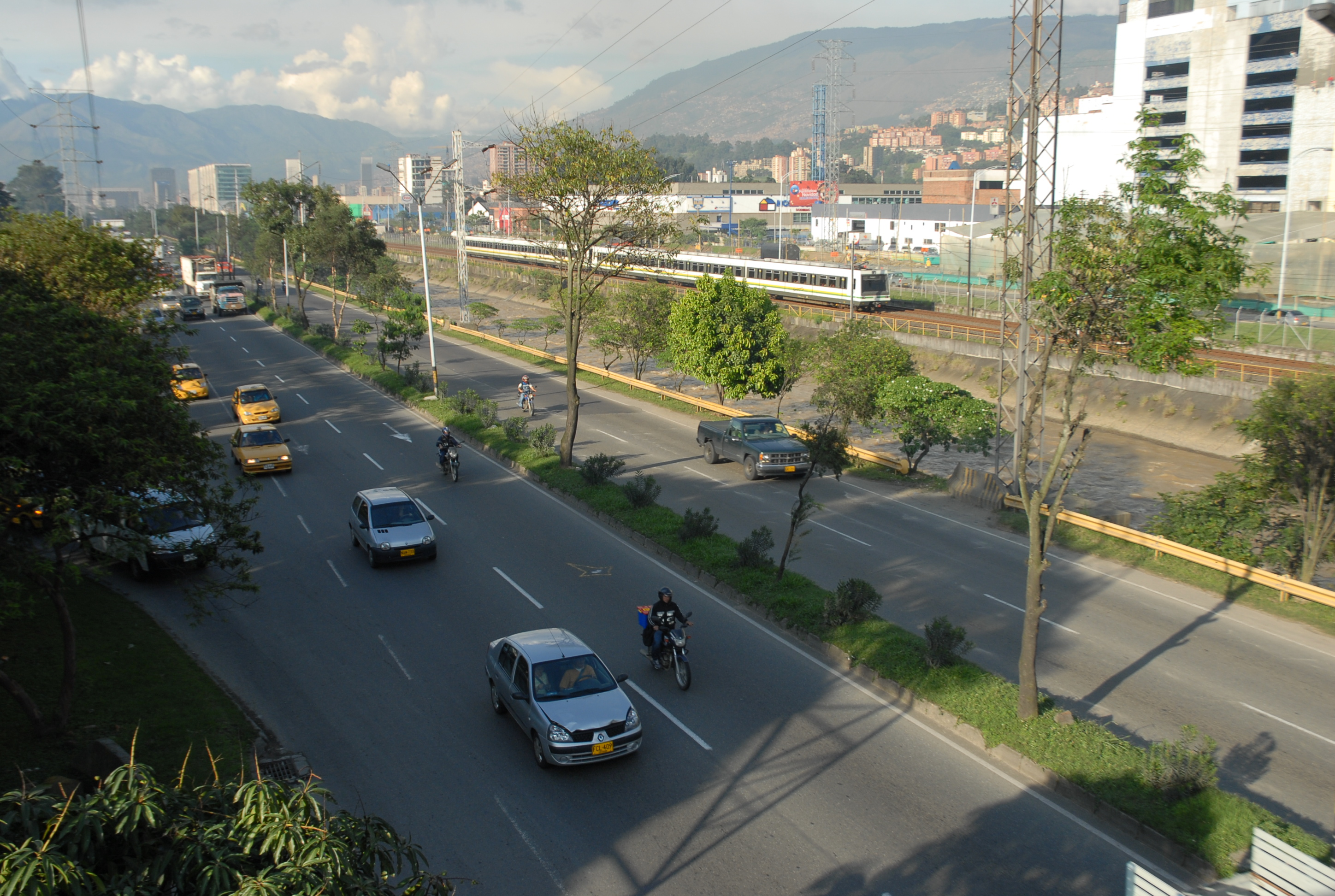 Avenida Regional en Medellín